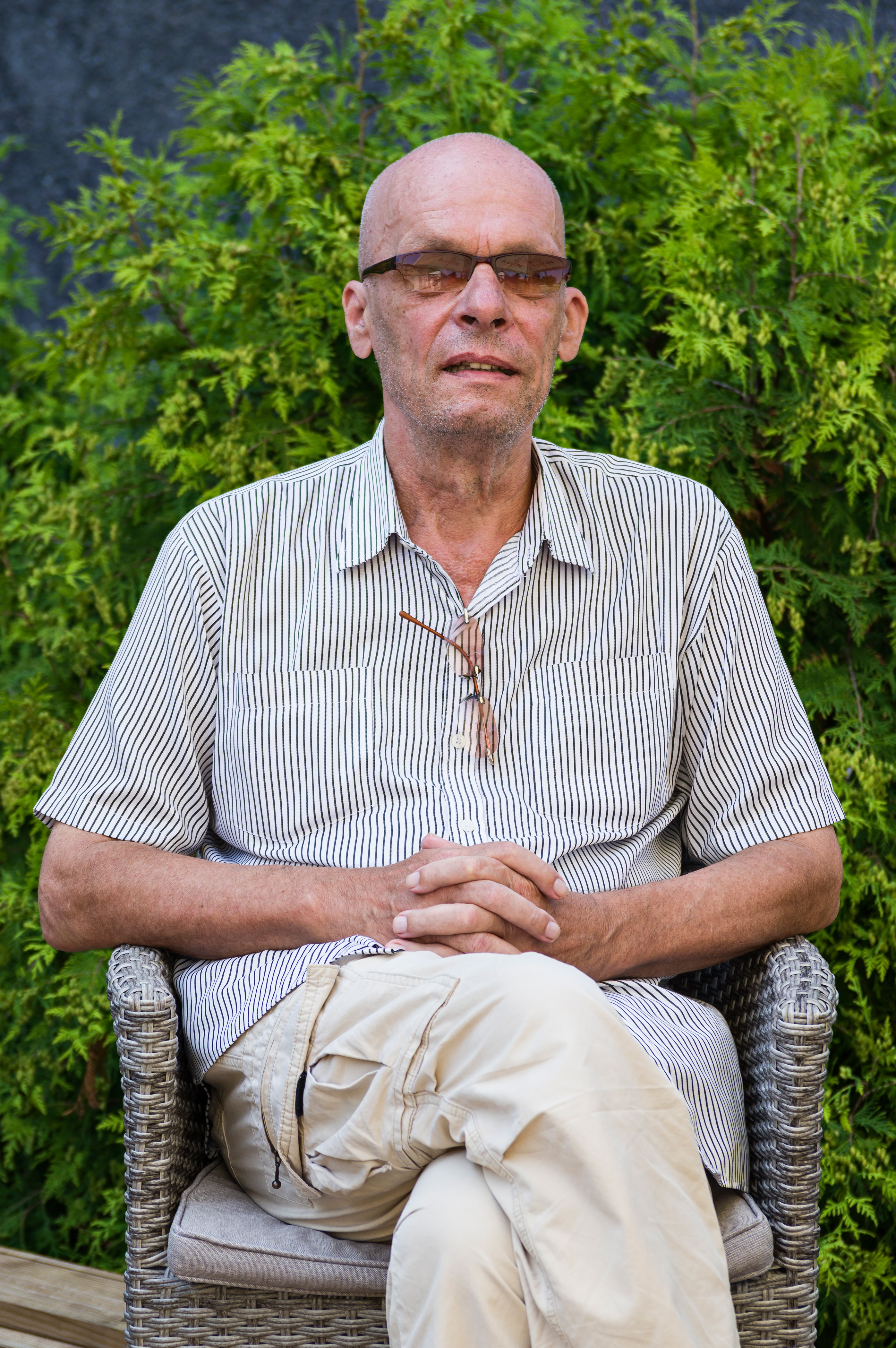 Tõnn Sarv eestikeelse Vikipeedia suvepäevadel 2019